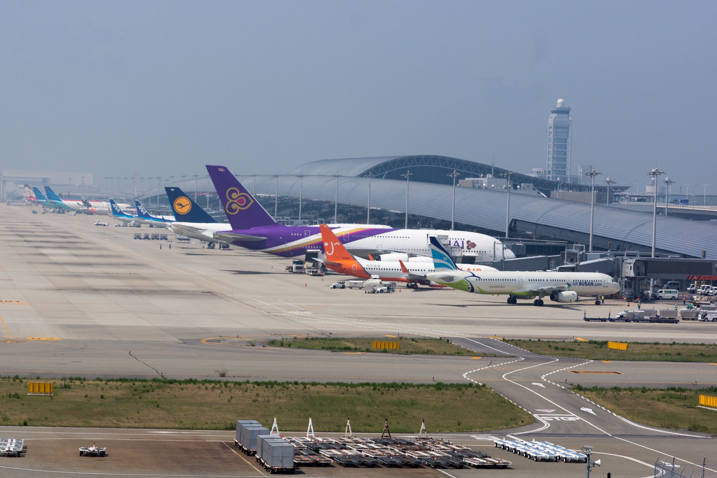 Osaka Kansai Int'l Airport Terminal1